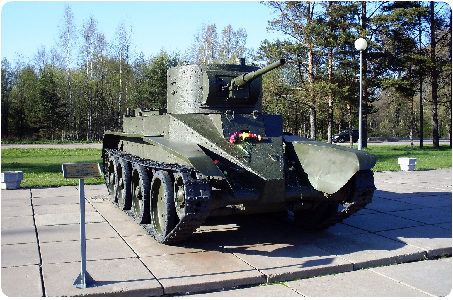 Музей-панорама в Кировске